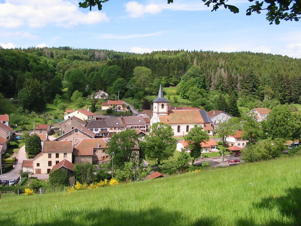 Saint-Stail Le Centre, vu des pentes de La Goutte Commune du canton de Senones (Vosges) Photo personnelle du 4 juin 2006. Copyright © Christian Amet